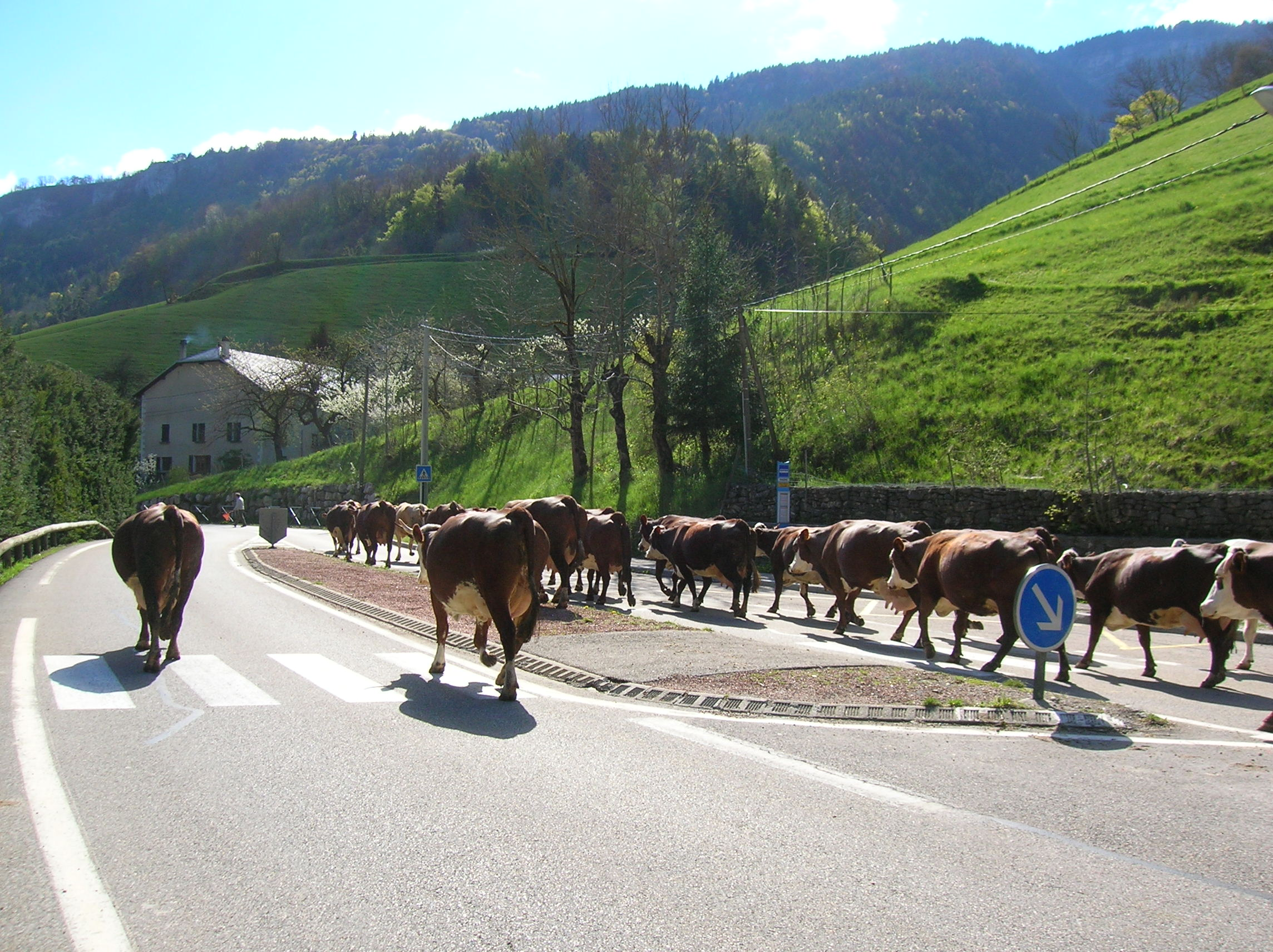 vaches vers le pâturage, Les Jeux, Engins, Isère, France.